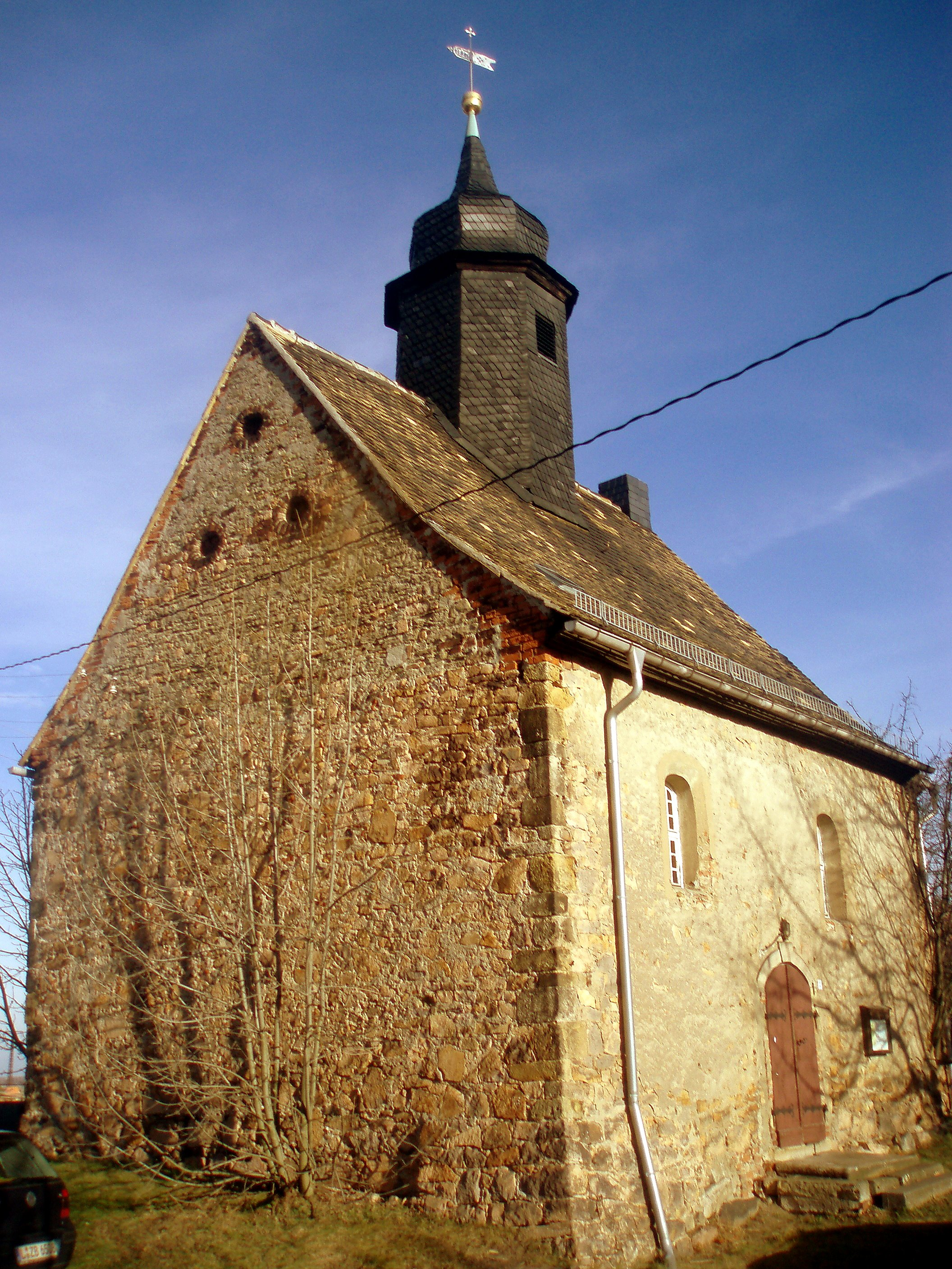 Emmauskirche in Heuersdorf bei Leipzig